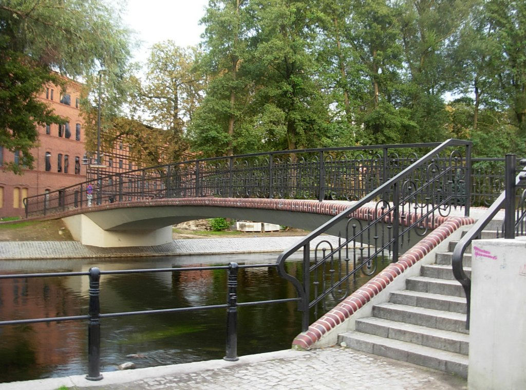 Kładka Krzysztofa Klenczona na Wyspie Młyńskiej w Bydgoszczy